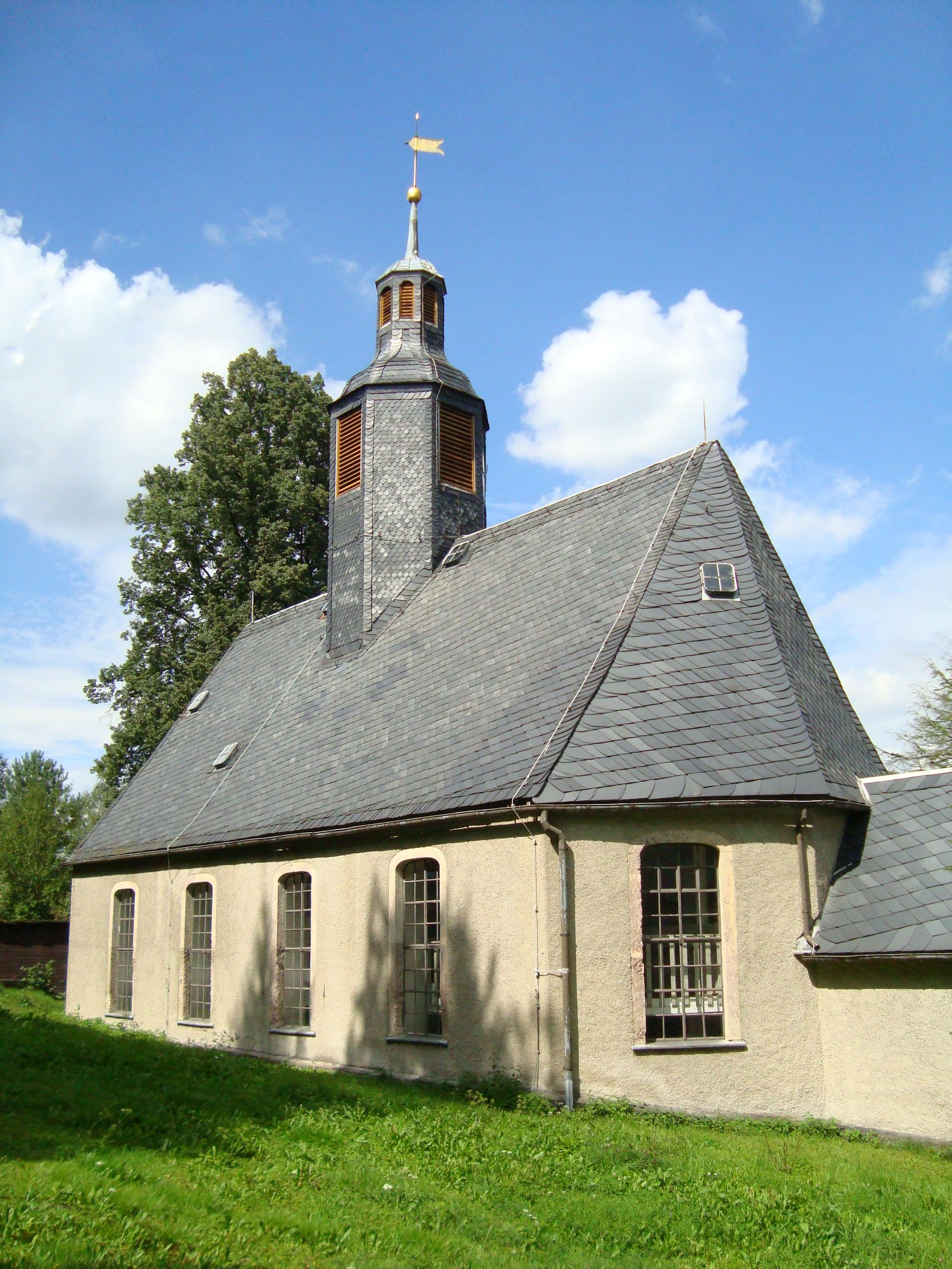 Kirche in Borstendorf im Erzgebirge